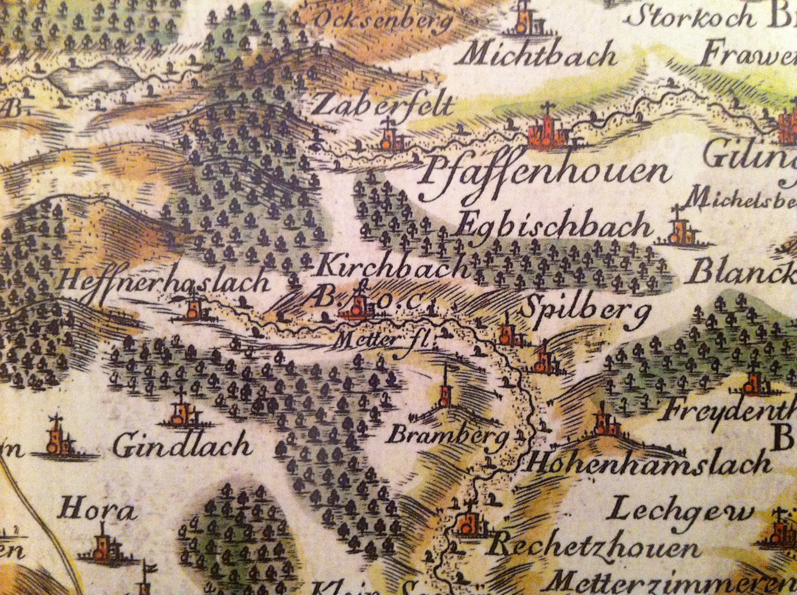 Ausschnitt einer Karte von Henri Sengre von verm. 1682, hier noch als Kirchbachhof mit Kirche verzeichnet